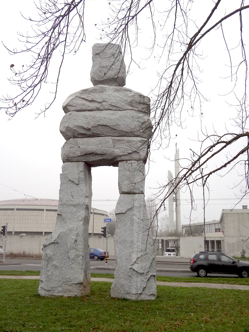 Art contemporain. Colosse de granit dominant la place des Deux-Églises à Onex (10 mètres de haut, 85 tonnes). Le sage (The Wise) Ugo Rondinone, 2014.